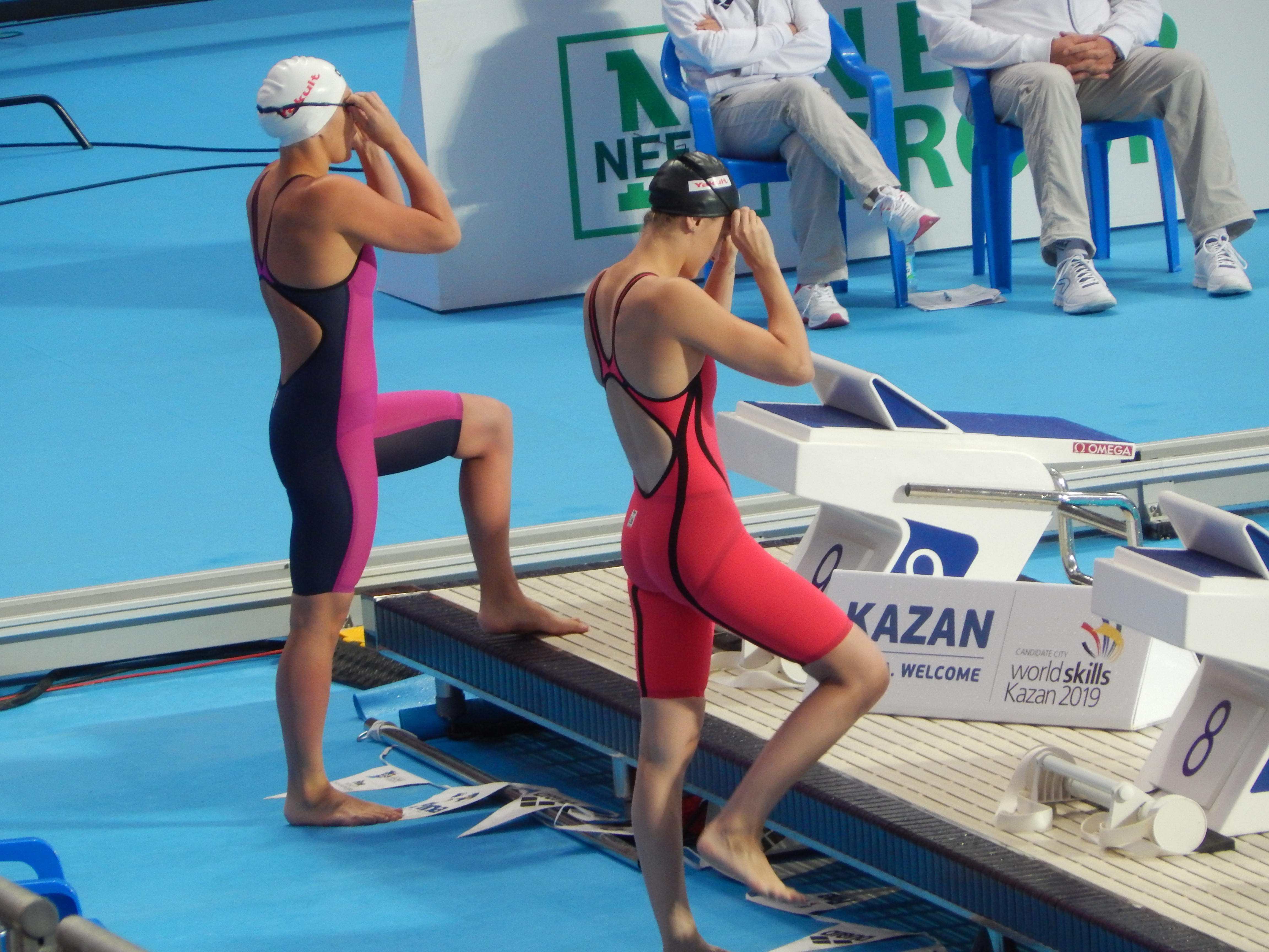 Lane 9: ROMANJUK Maria EST Lane 8: CHISCA Tatiana MDA